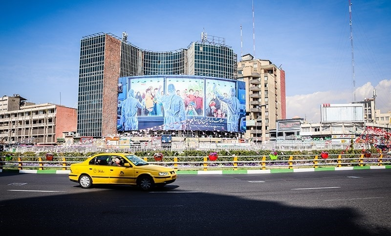 روزهای خلوت تهران